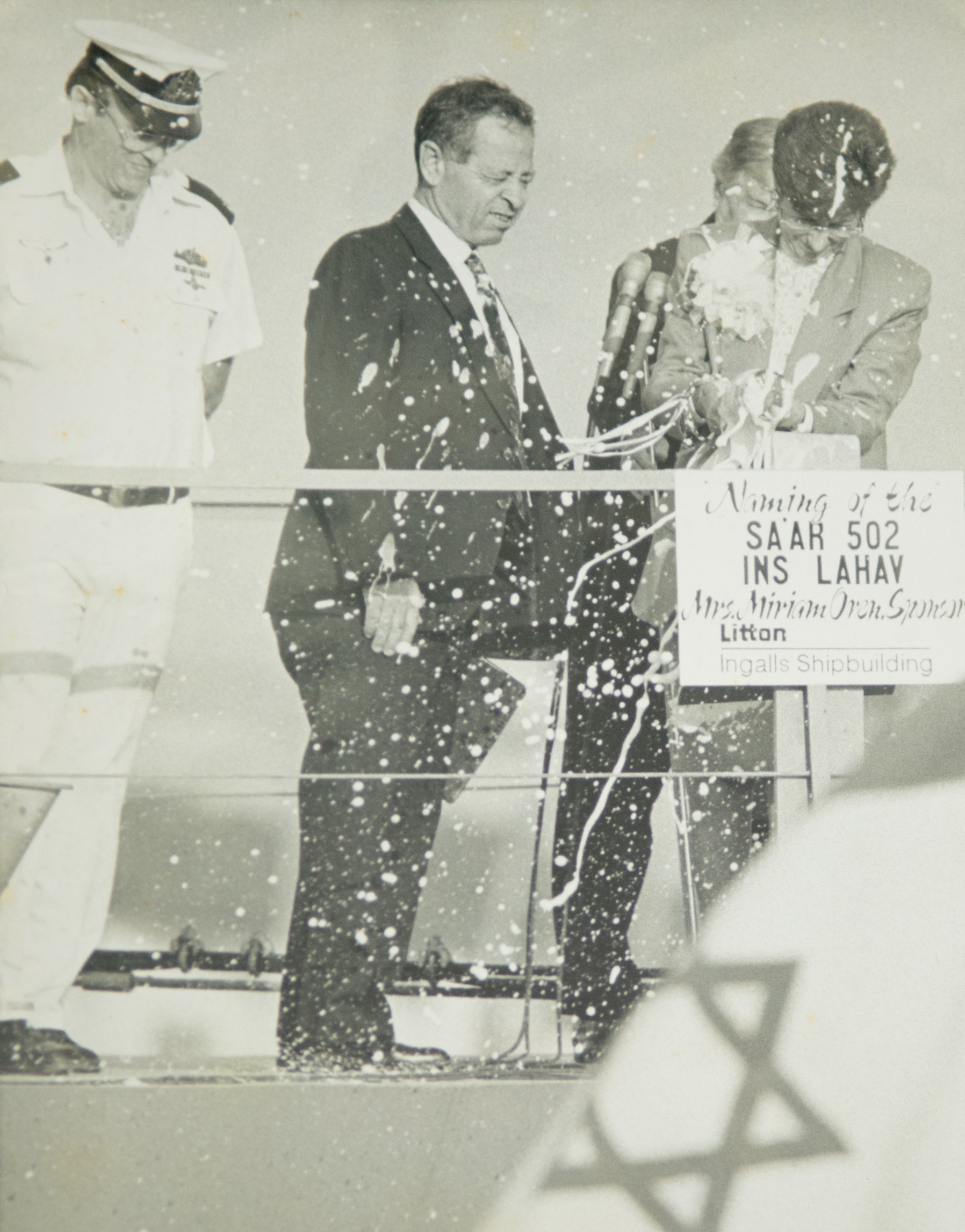 טקס השקת אח"י להב קורבטת טילים ראשונה מדגם סער 5 במספנות אינגלס בארצות הברית אוגוסט 1993.